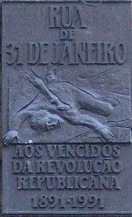 detalhe da placa na Rua de 31 de Janeiro no Porto, Portugal em homenagem à Revolta de 31 de janeiro de 1891.